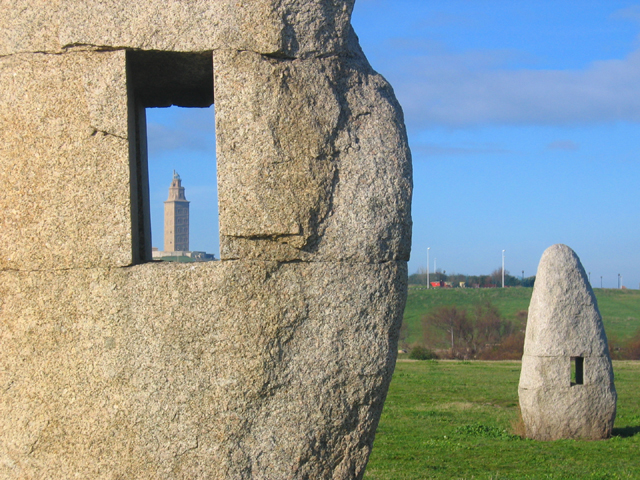 Menhires en la Torre de Hércules.